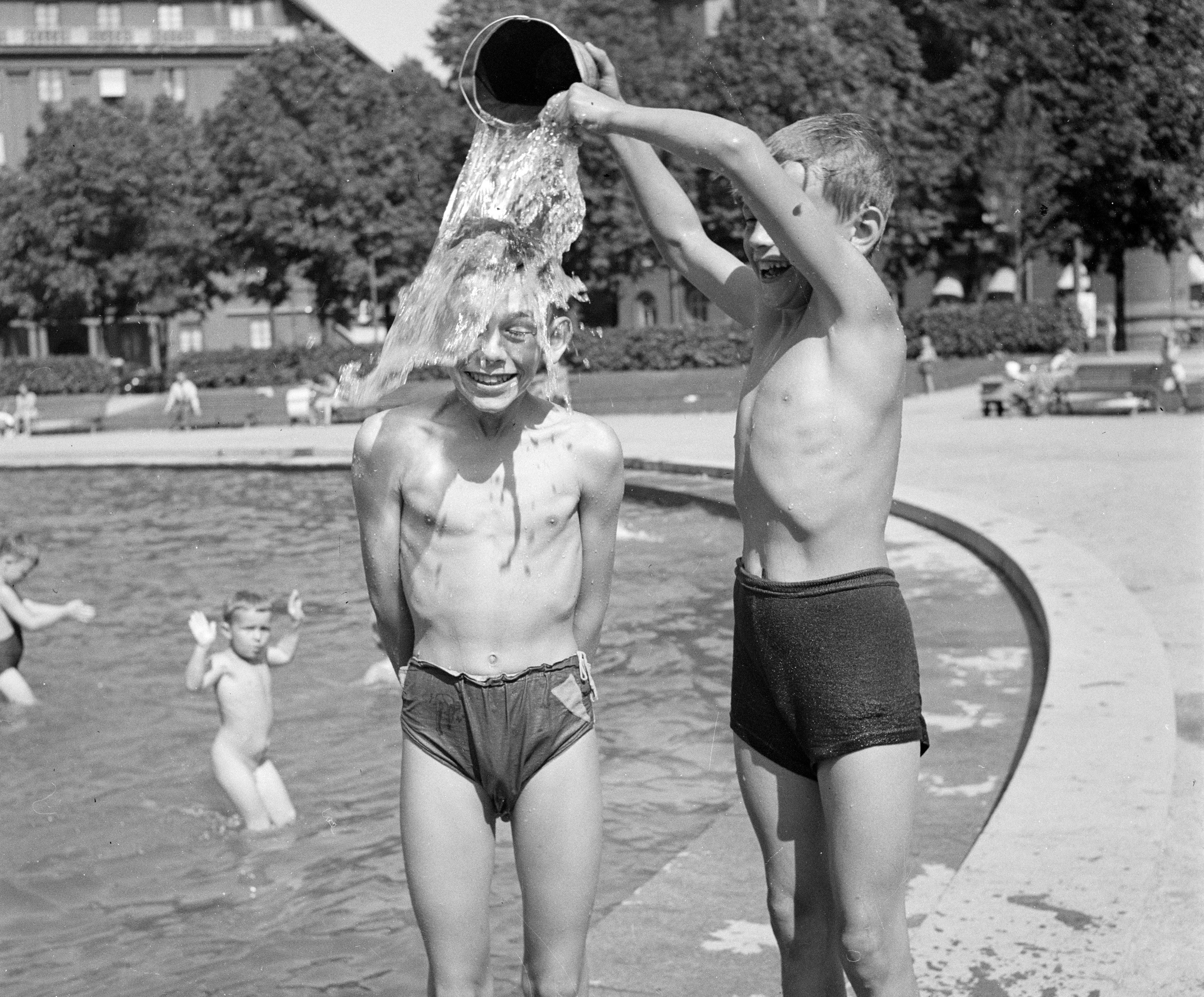 Karlaplan. Barn leker och häller vatten på varandra i fontändammen